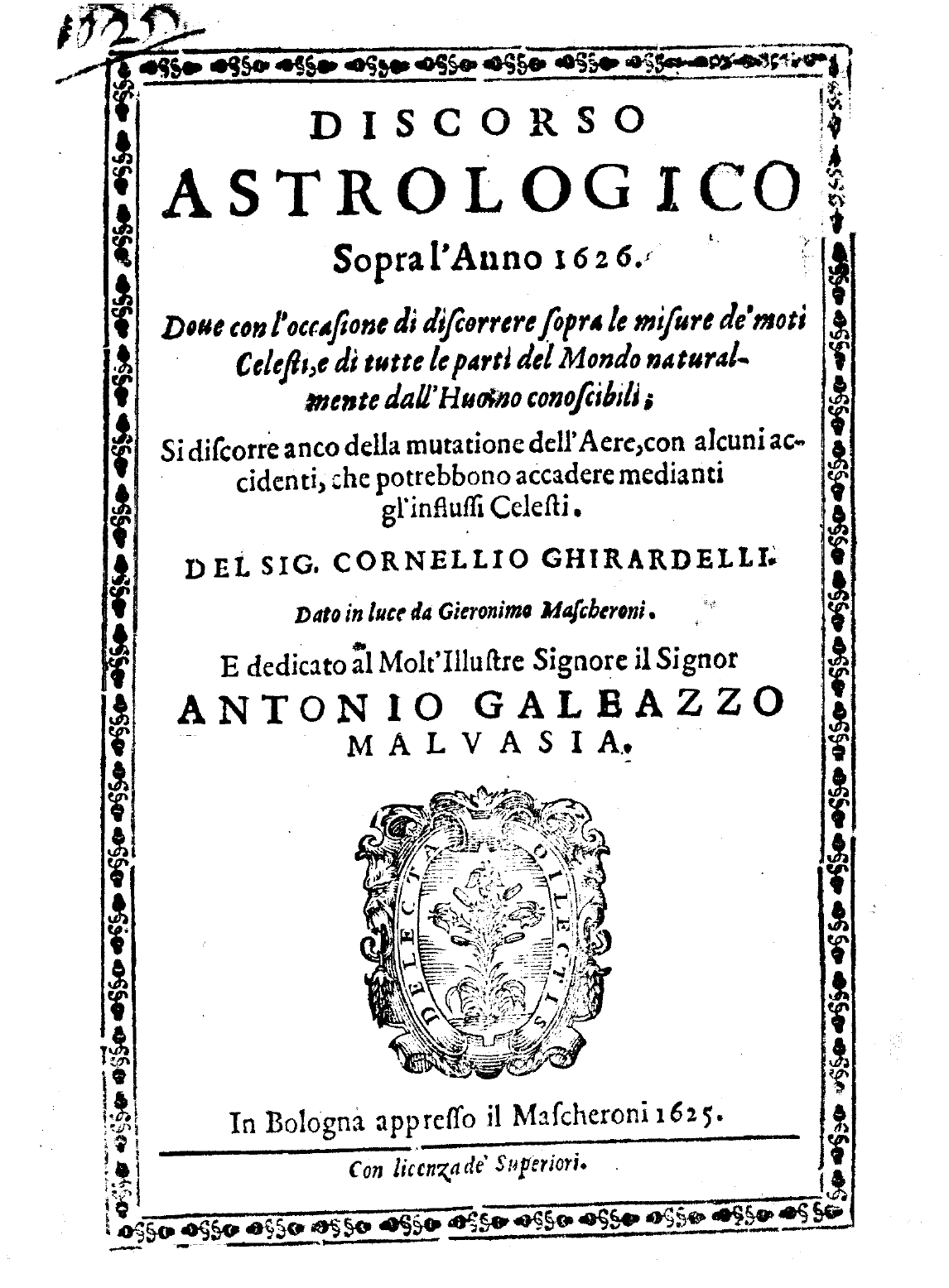 Frontespizio